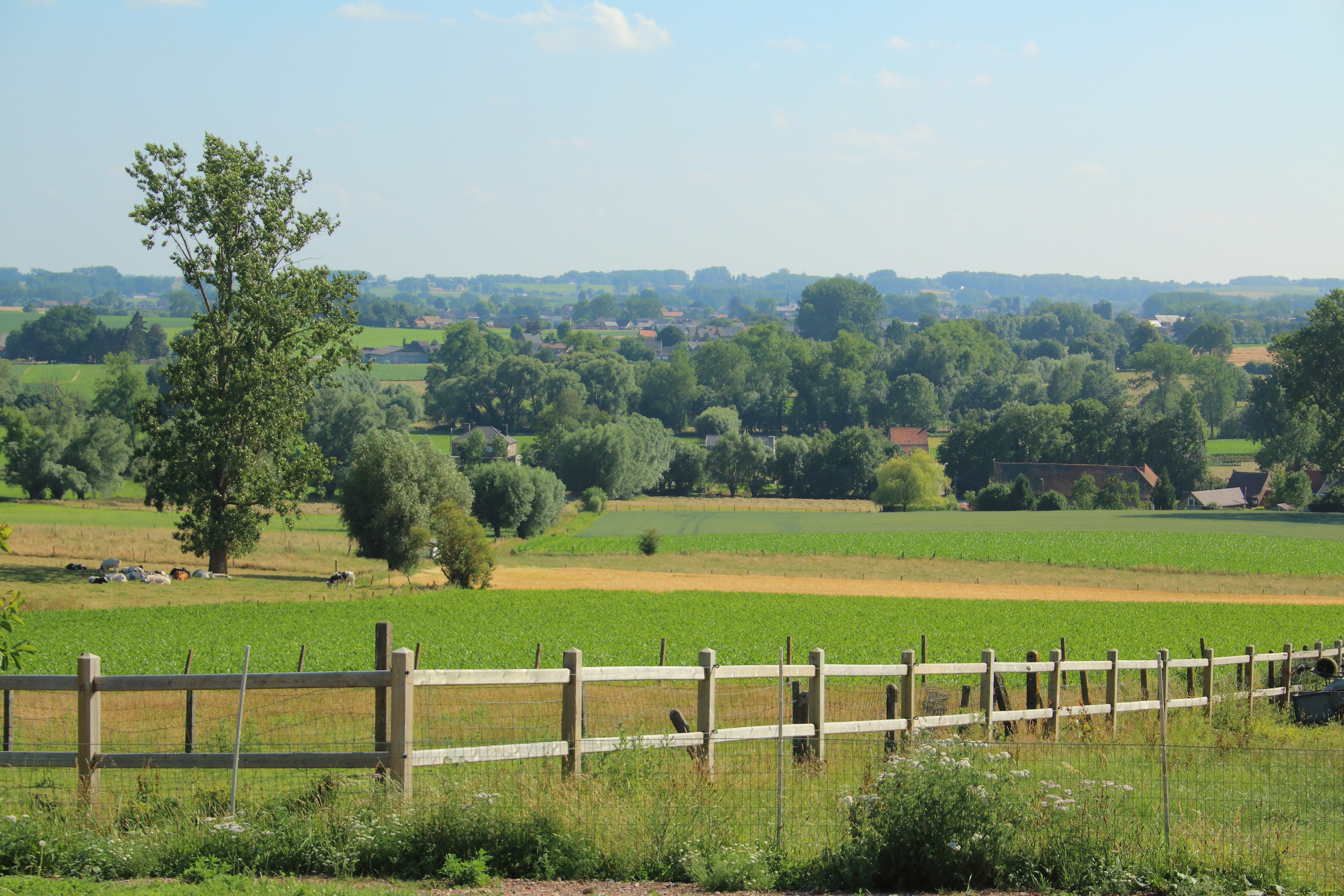 Waesberg, Vlaamse Ardennen, Lierde, Vlaanderen, België